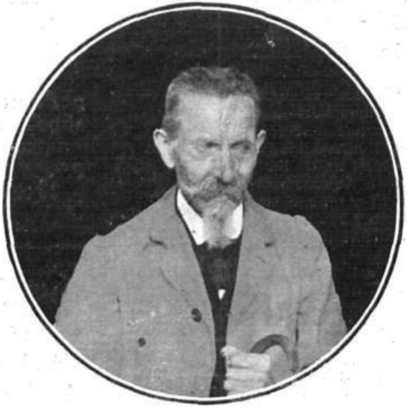 Alexandre Novellas i Vidal (Barcelona, 22 d'agost de 1830 - 9 d'octubre de 1910), fou un doctor en Dret civil i canònic[1], catedràtic de matemàtiques i mecànica industrial català[2]. Fou catedràtic de matemàtiques als instituts de Lleida i de Figueres i de mecànica industrial a l'institut de Barcelona, del que fou director[1].